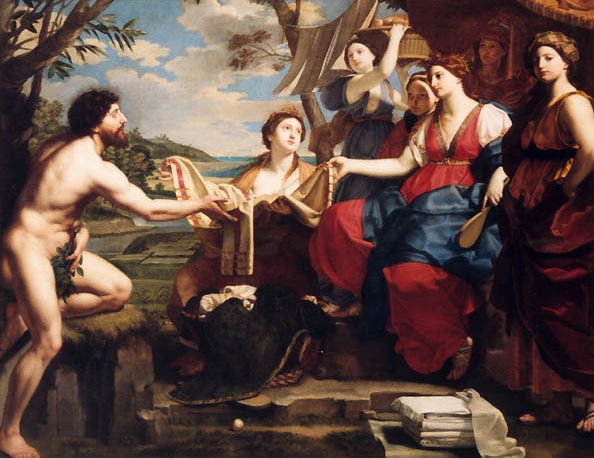 è un quadro che si trova a Napoli nel Museo di Capodimonte, facente parte della Collezione Farnese. In virtù della errata attribuzione a Guido Reni, l'opera era stata trasferita nel 1798 a Palermo, e nel 1925 a Montecitorio a Roma. Attraverso una composizione classicheggiante viene illustrato quasi alla lettera l'episodio del VI libro dell'Odissea dell'incontro di Ulisse e Nausicaa.